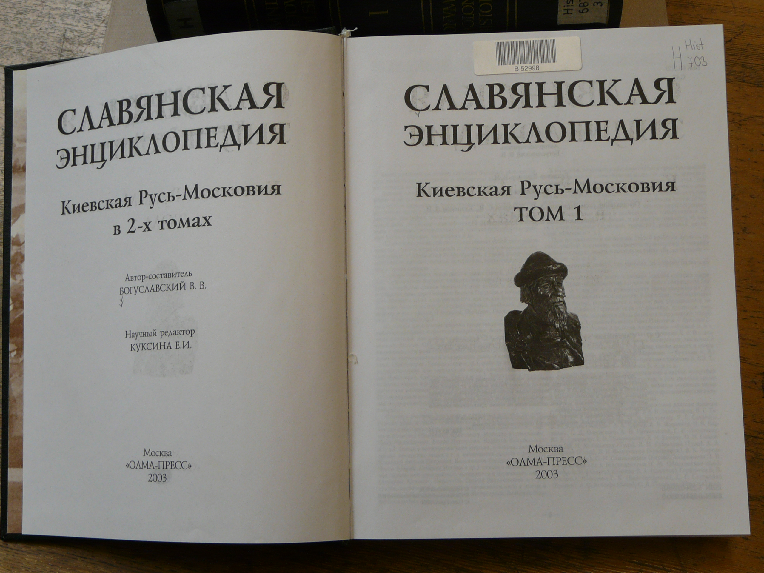 титульная страница Славянской энциклопедии